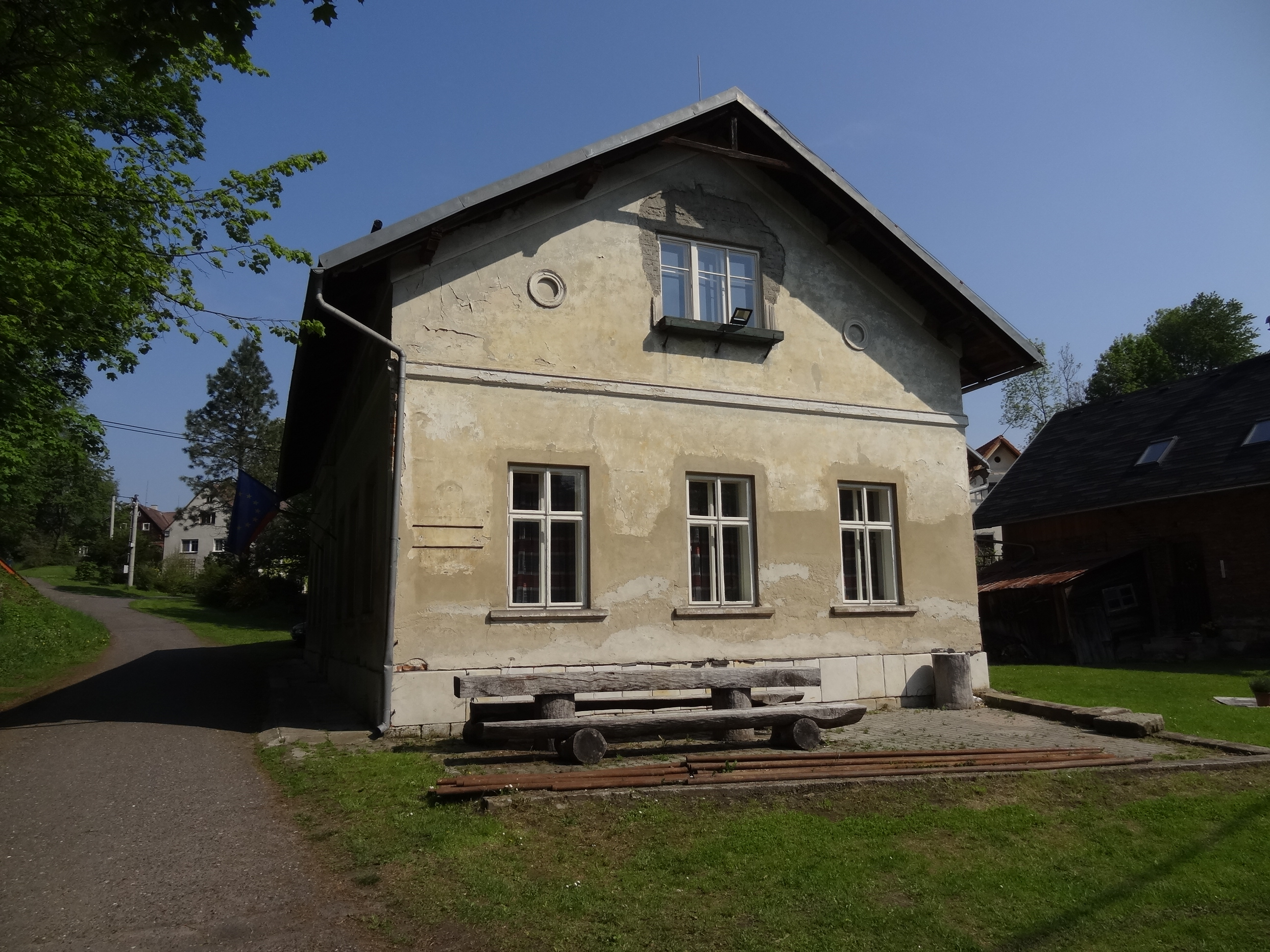 Modlibohov - čp. 34